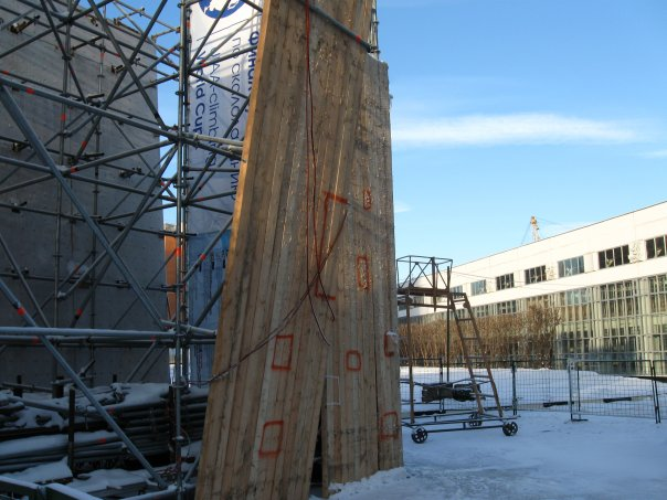 Щит для занятий драй-тулингом. Дворец детского спорта. Москва